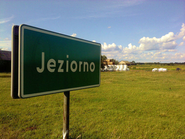 Wjazd do Jeziorna od strony Bierwiec.